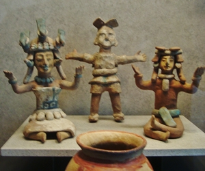 Estas figurillas sedentes proceden de la región de la Costa, donde floreció el señorío mixteco de Tututepec. Forman parte de la colección del Museo Nacional de Antropología (Mëxico).